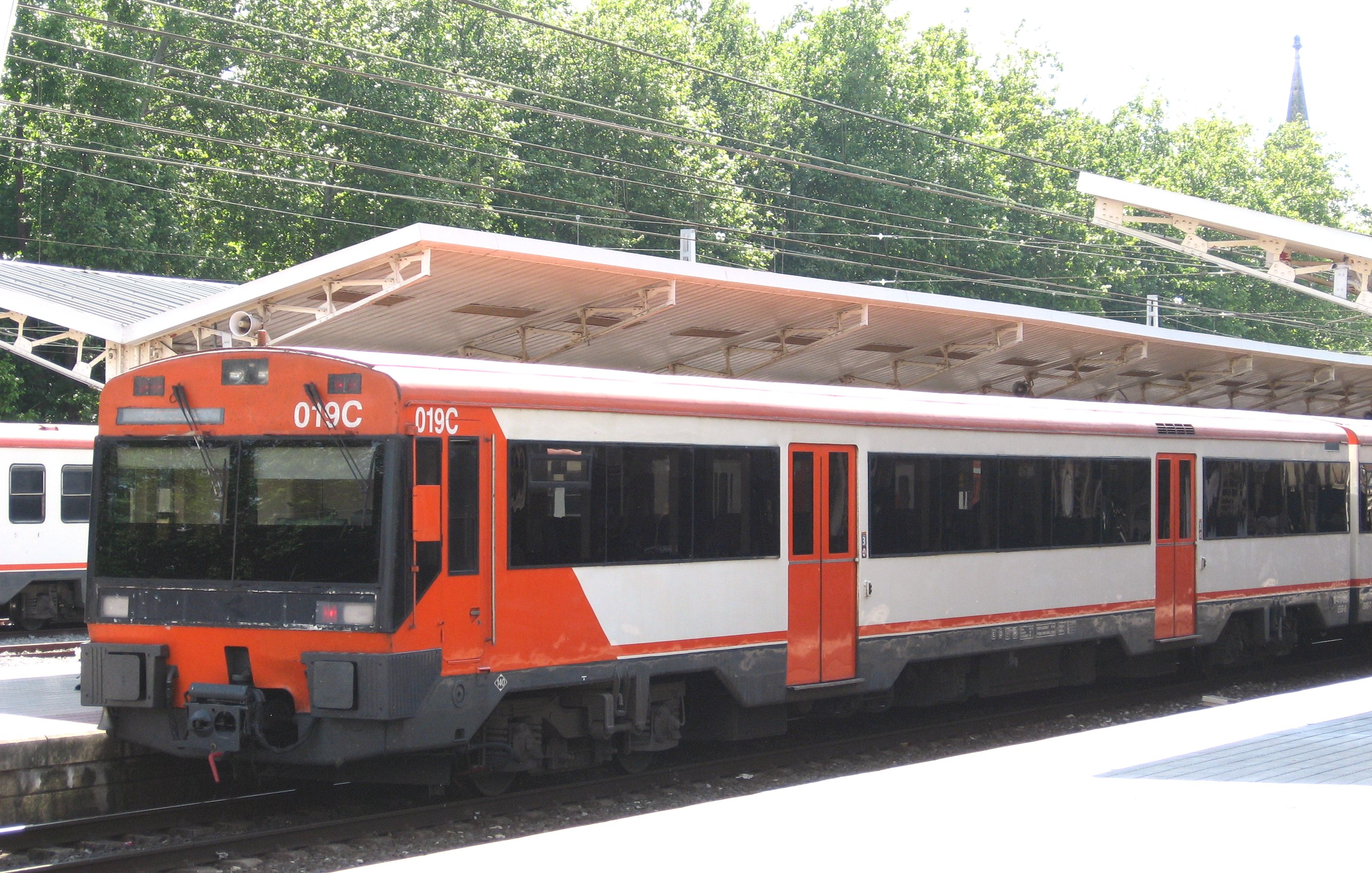 Desc: 470-074 (074M-066R-019C) en la estación del ferrocarril de Vitoria-Gasteiz.